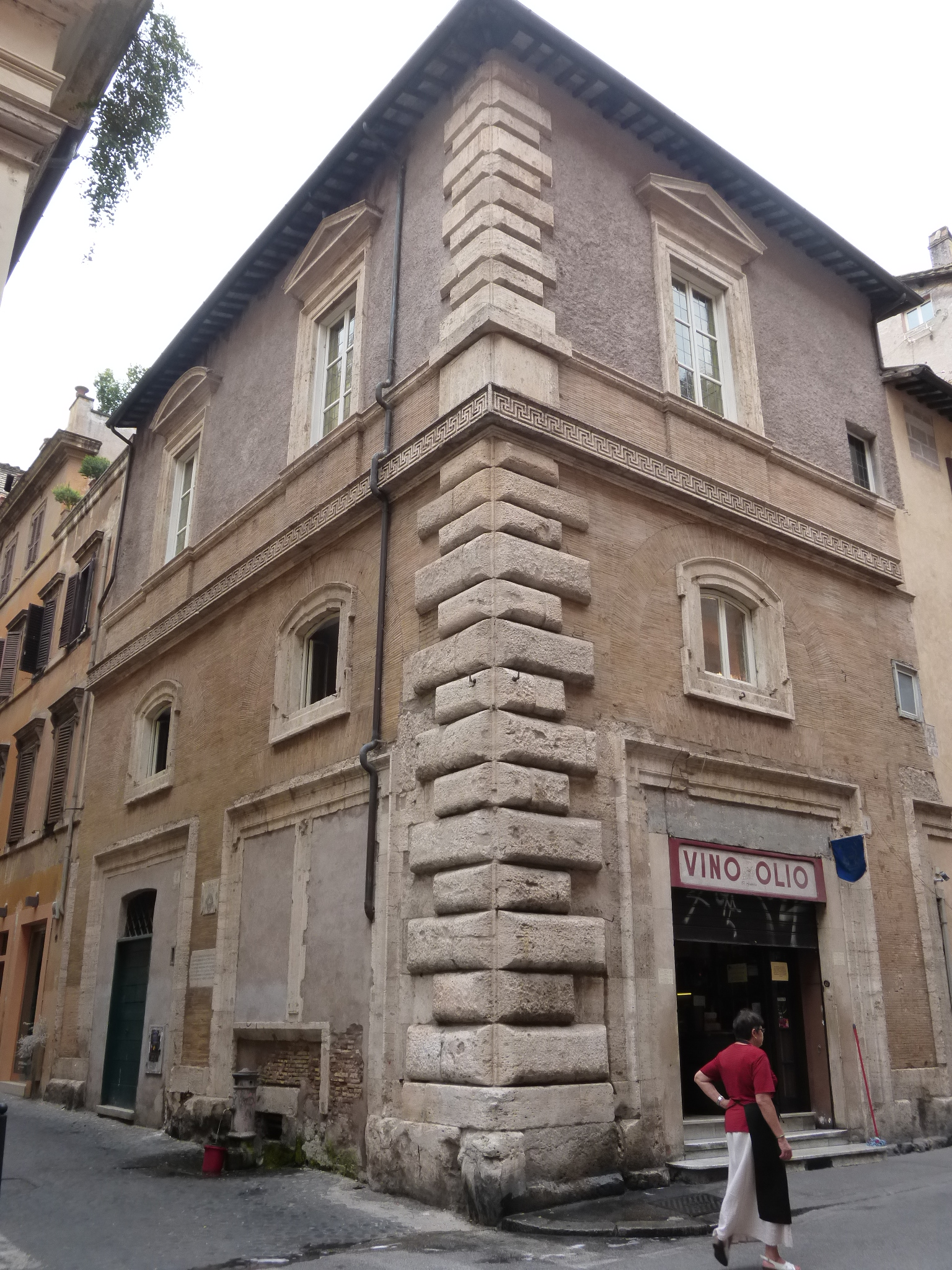 Roma, via dei Banchi Vecchi angolo via delle Carceri, palazzetto del vescovo di Cervia